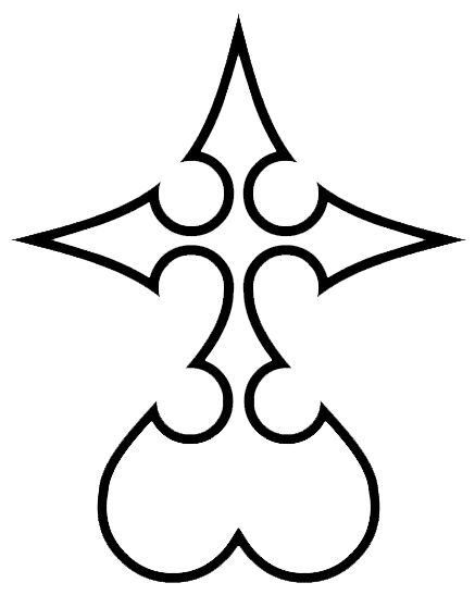 logo incorpóreos